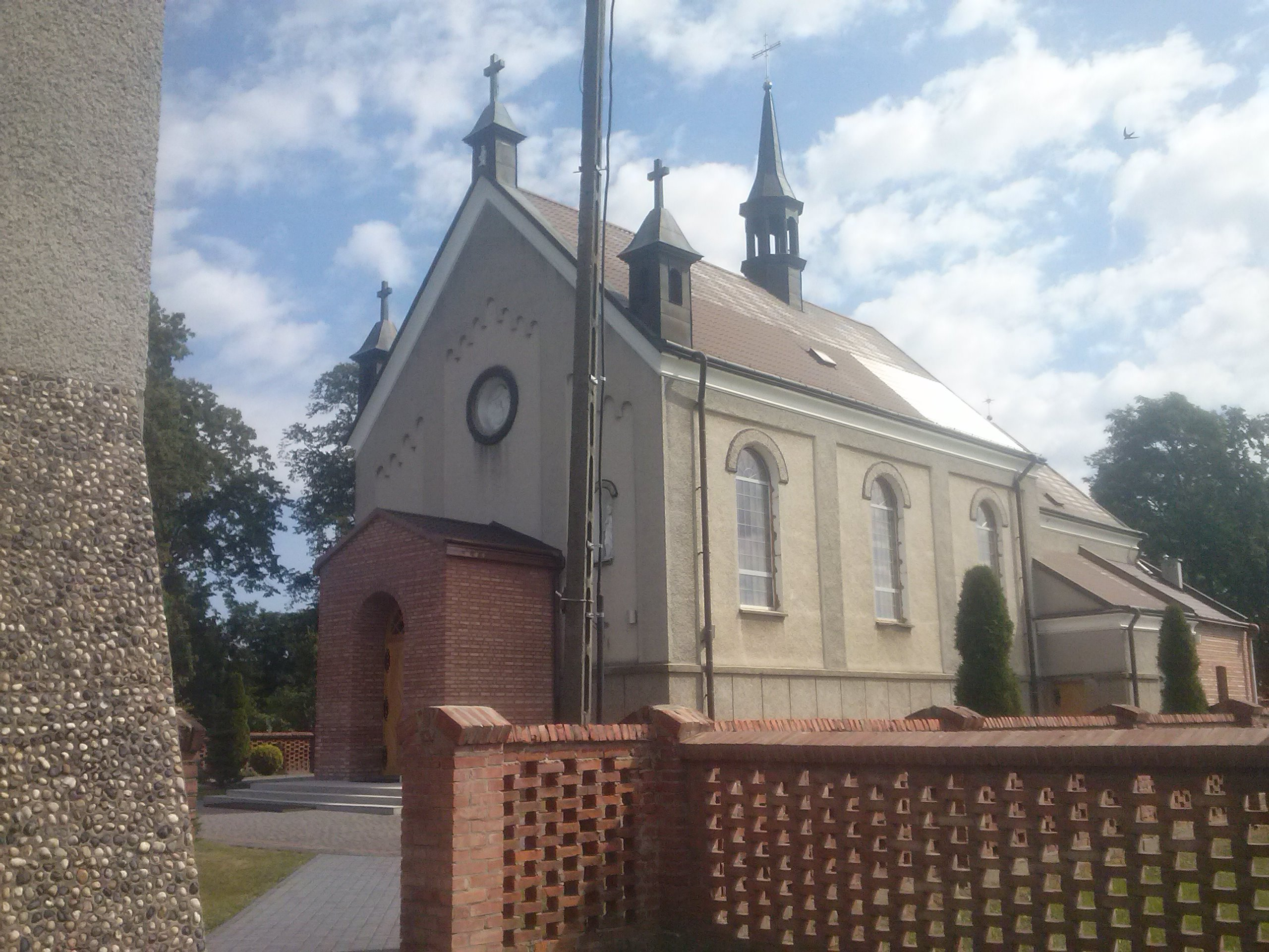 Kościół parafialny w Dębnie